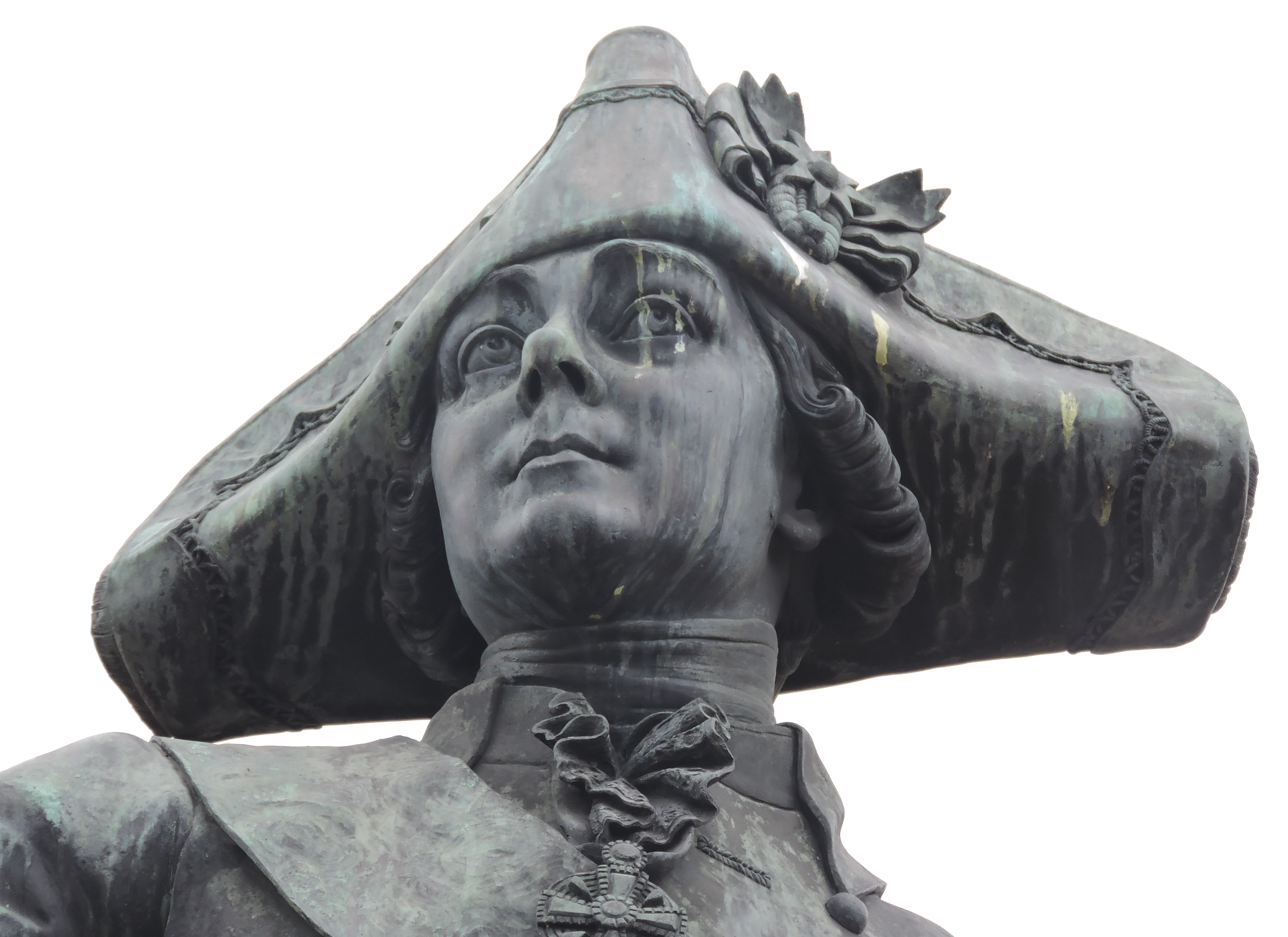 Голова Павла Петровича (памятник в Гатчине)